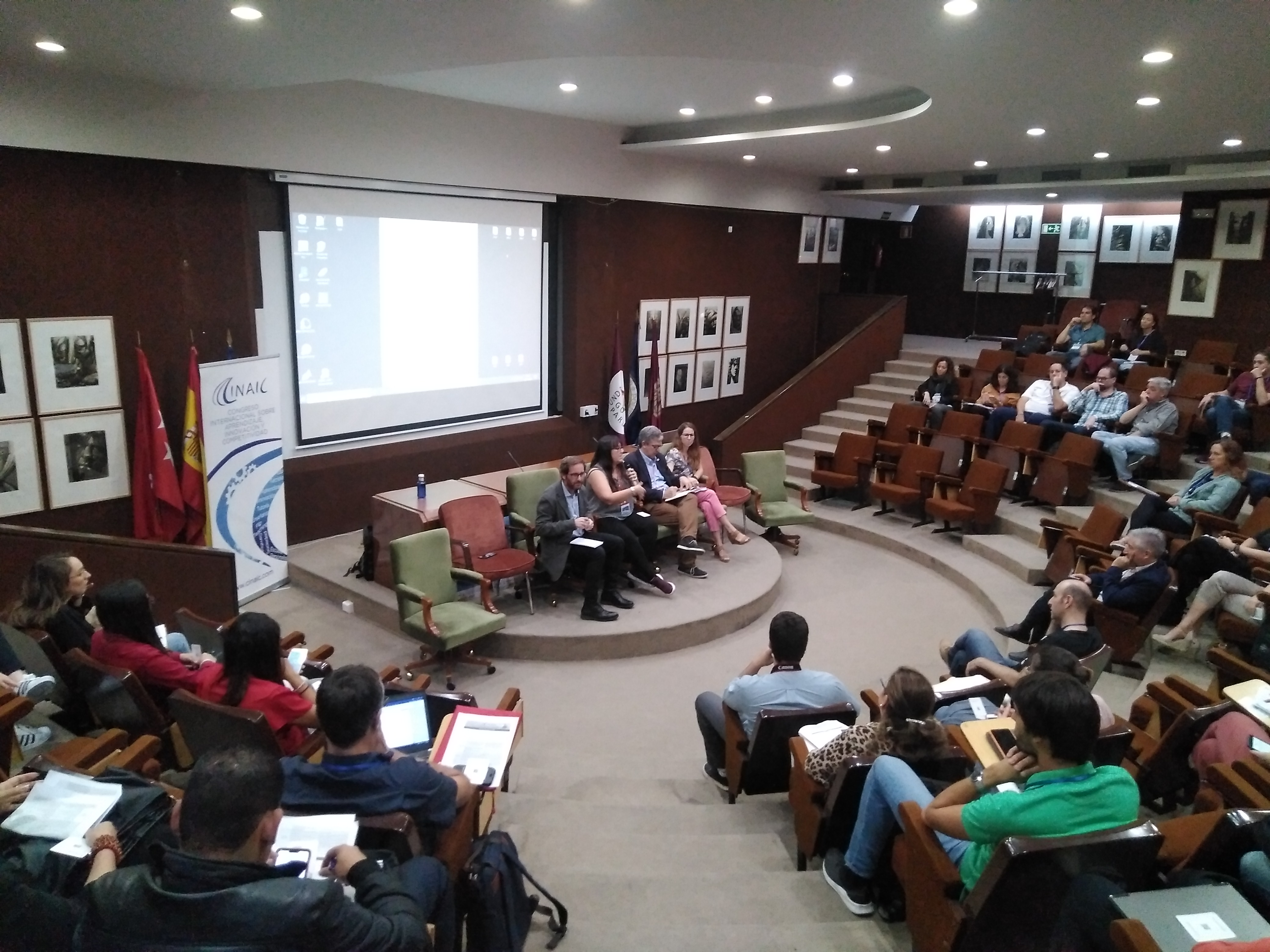 V Congreso Internacional sobre Aprendizaje, Innovación y Cooperación (CINAIC) en el Salón de Actos de la Fundación Gómez Pardo, Madrid (España). Mesa de palabras moderada por Carlos Magro Mazo. Vicepresidente Asociación Educación Abierta